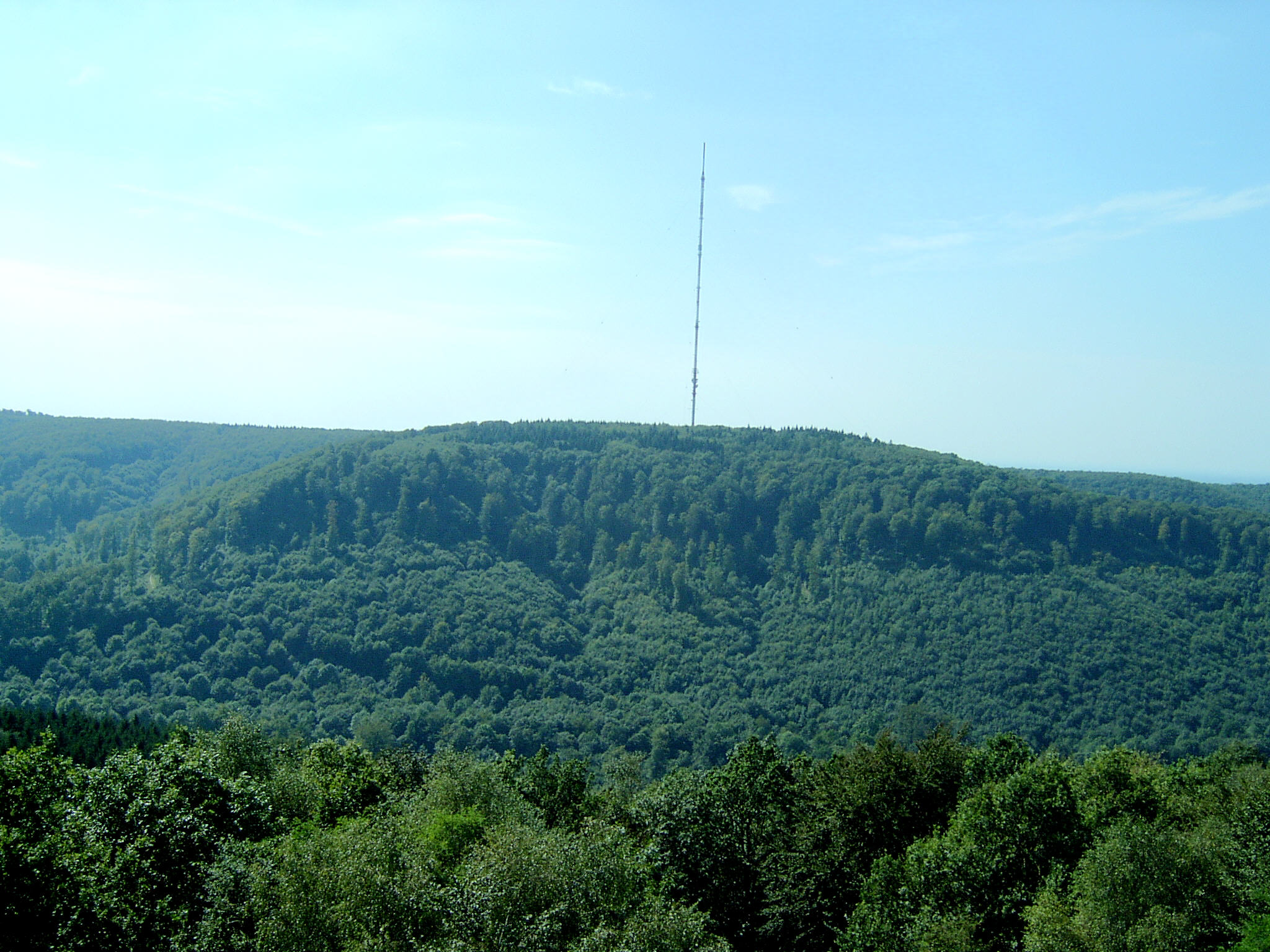 Blick vom Hermannsdenkmal auf dem Teutberg Richtung Bielstein mit seinem Sendemast im Teutoburger Wald taken by myself (Arminia)